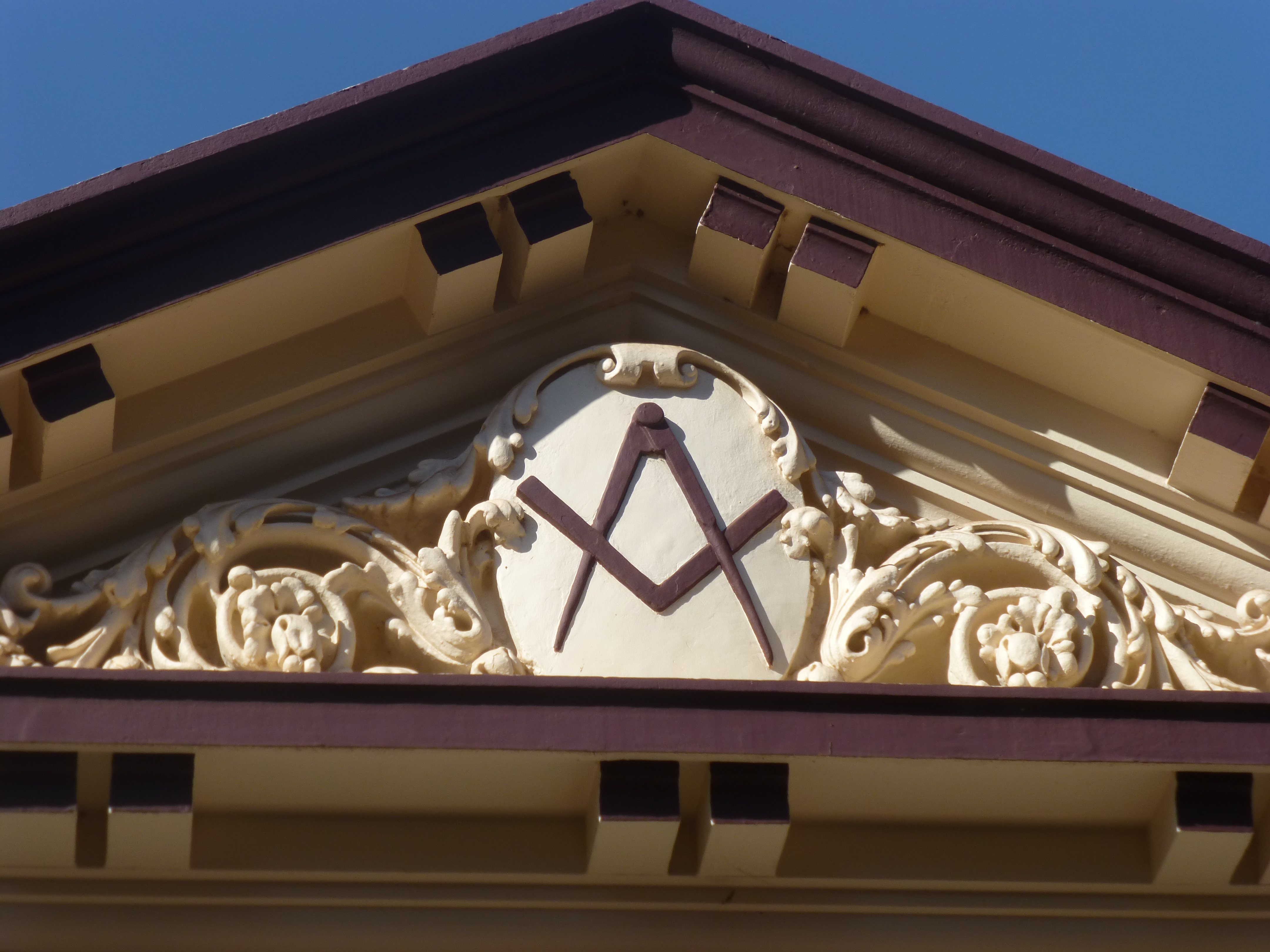 Logia Masónica Roque Pérez de la ciudad de Posadas, provincia de Misiones.